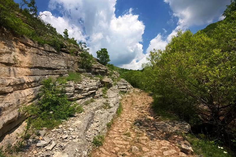 Клисура Горњи Криводол